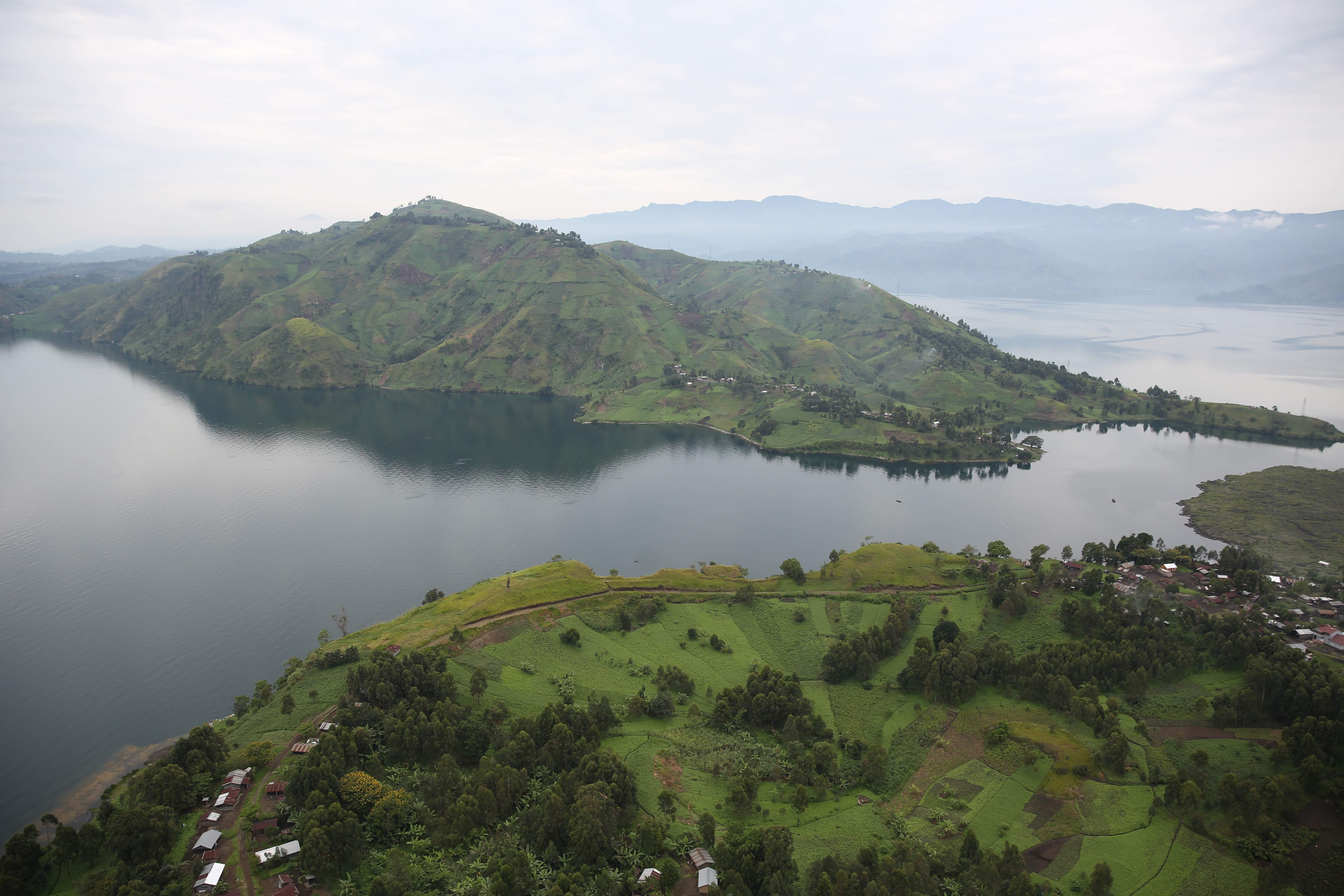 photo MONUSCO / Abel Kavanagh